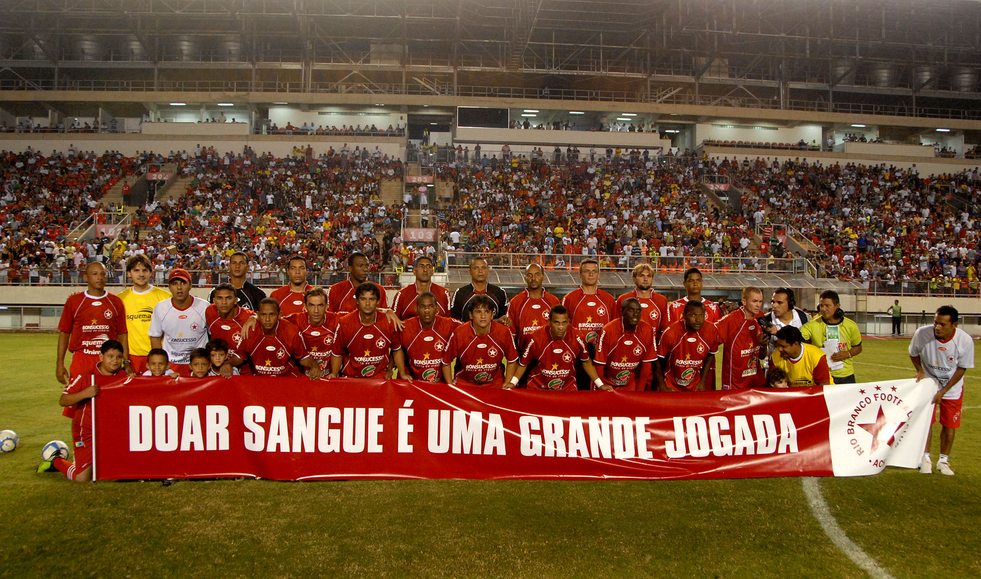 Rio Branco surpreende, joga bem e vence o Atlético Paranaense na Arena da Floresta